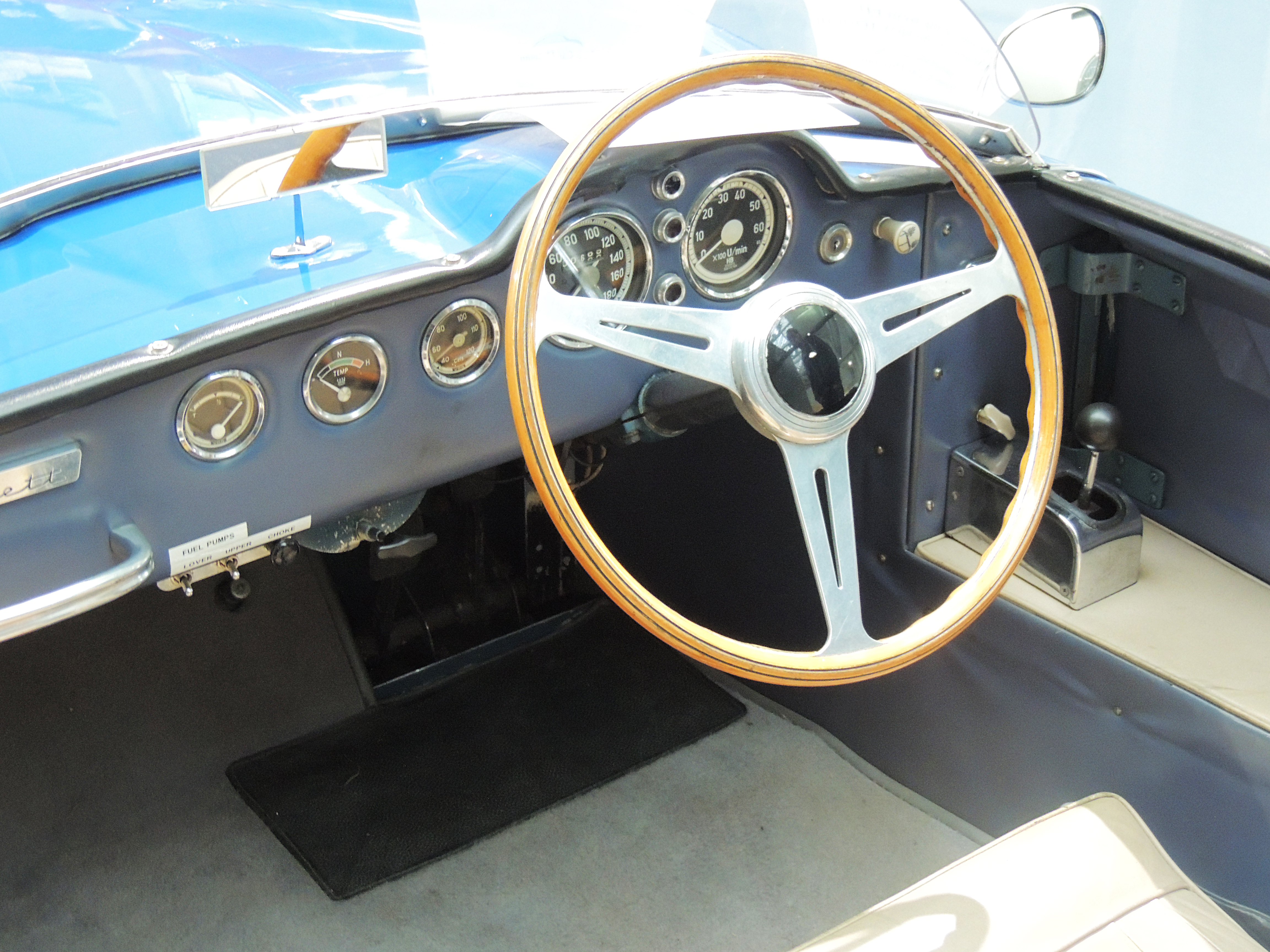 Wnętrze Saab Sonett I